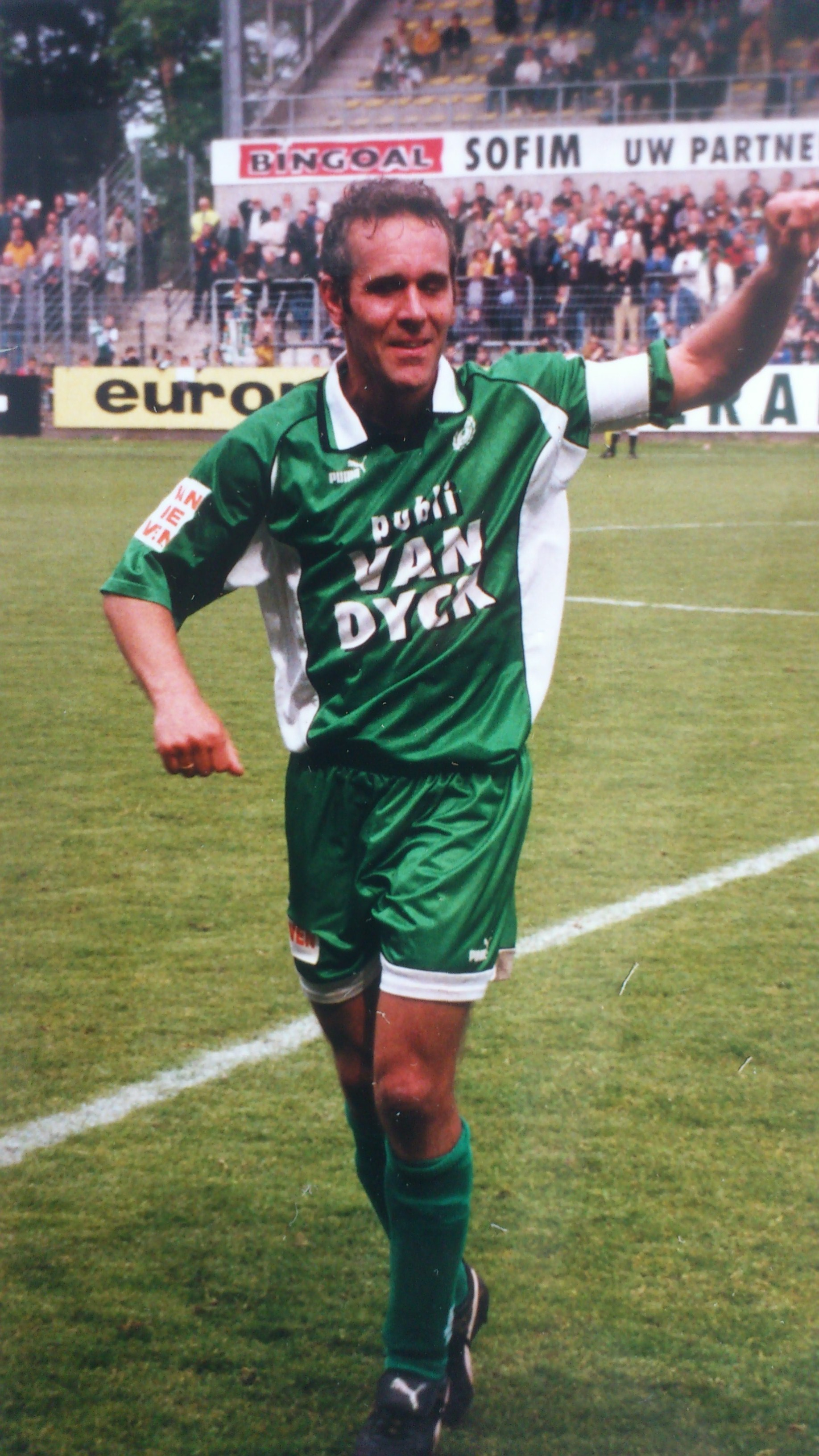 van Veldhoven bij zijn vervanging tijdens afscheidswedstrijd